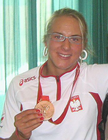 Agnieszka Wieszczek